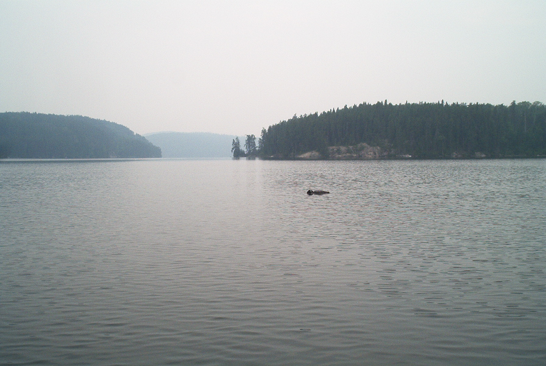 Esnagi Lake Loon